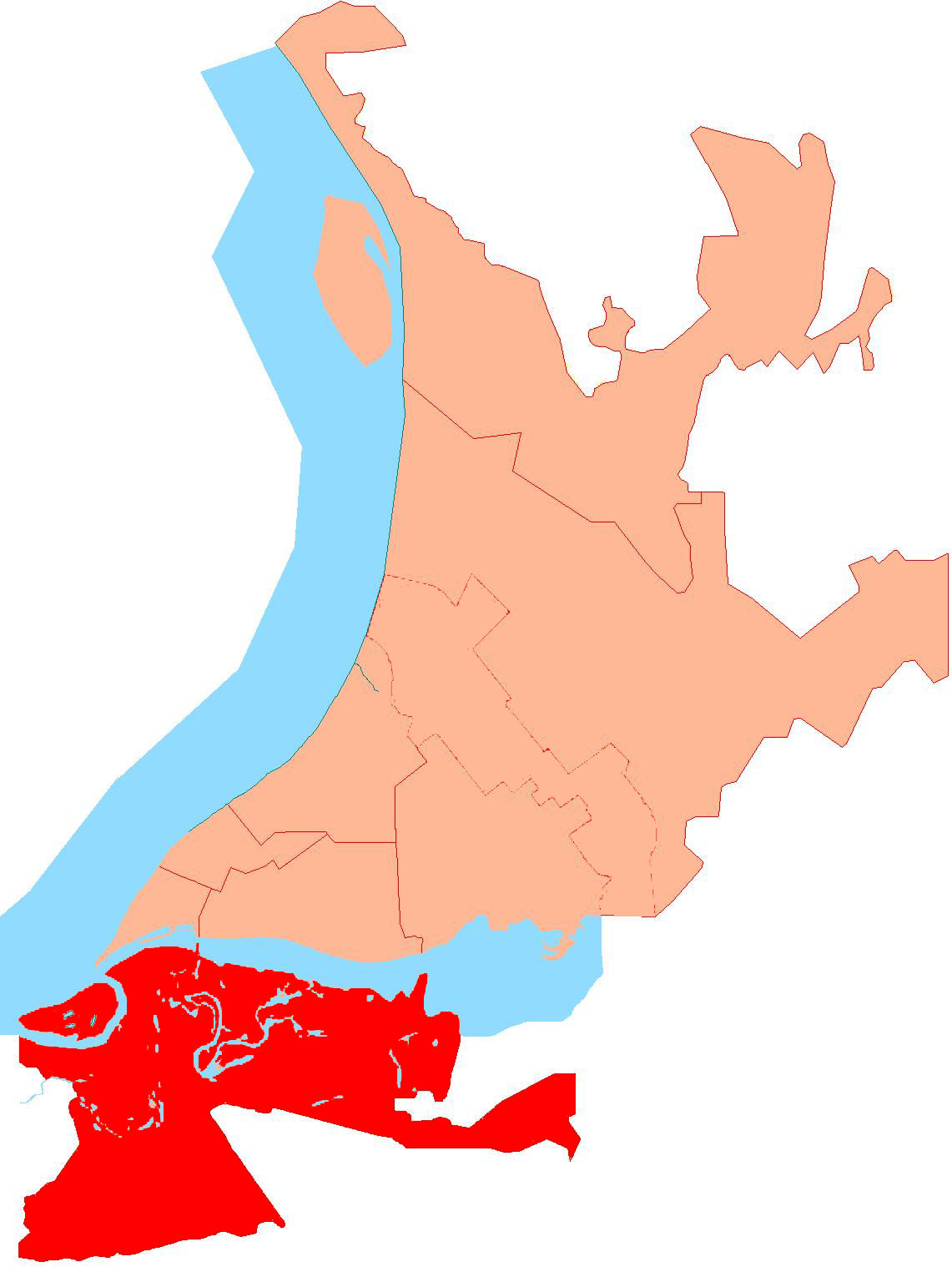 Samara district